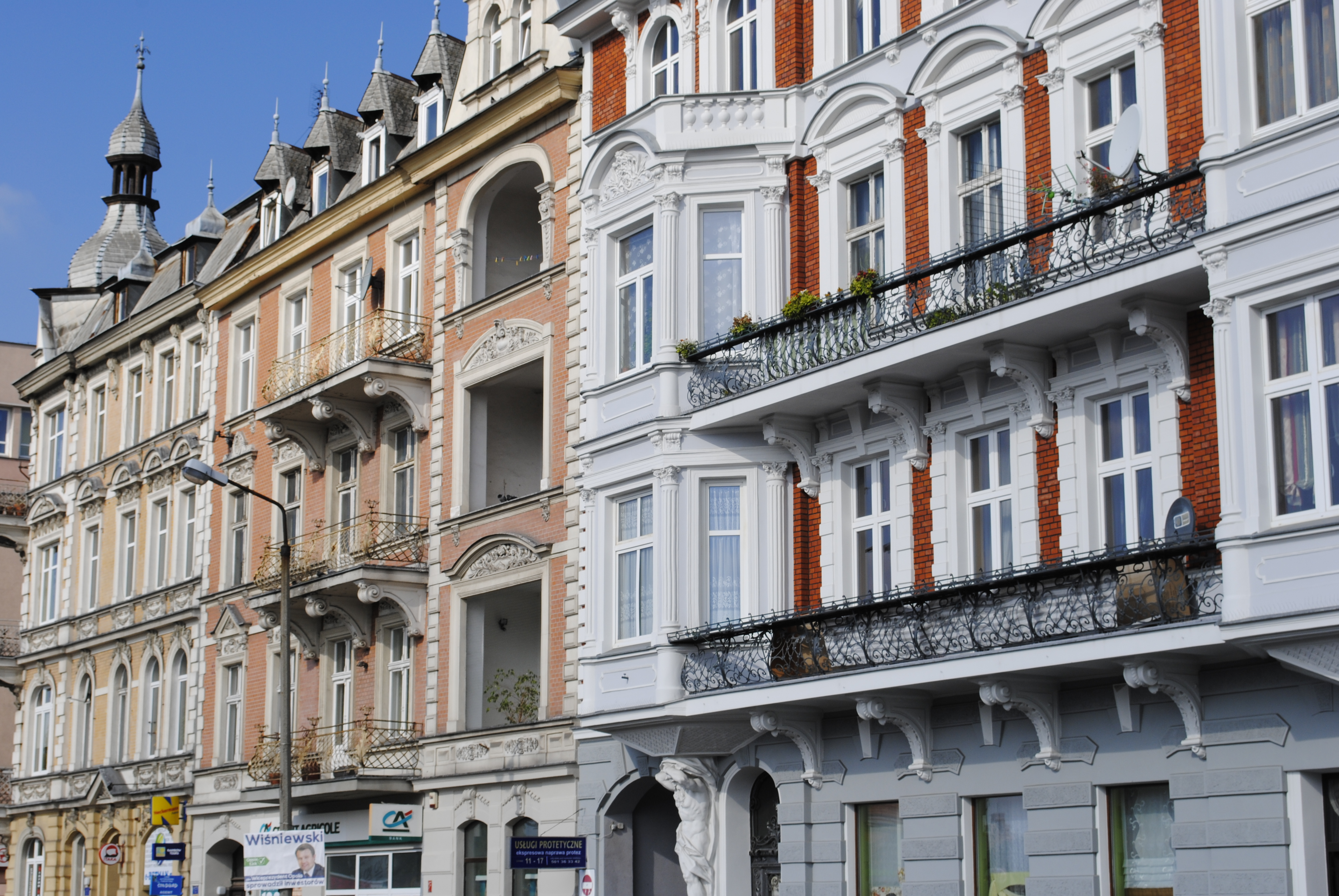 Gründerzeitliche Bauten an der Ul. 1-maja (1. Mai Straße)